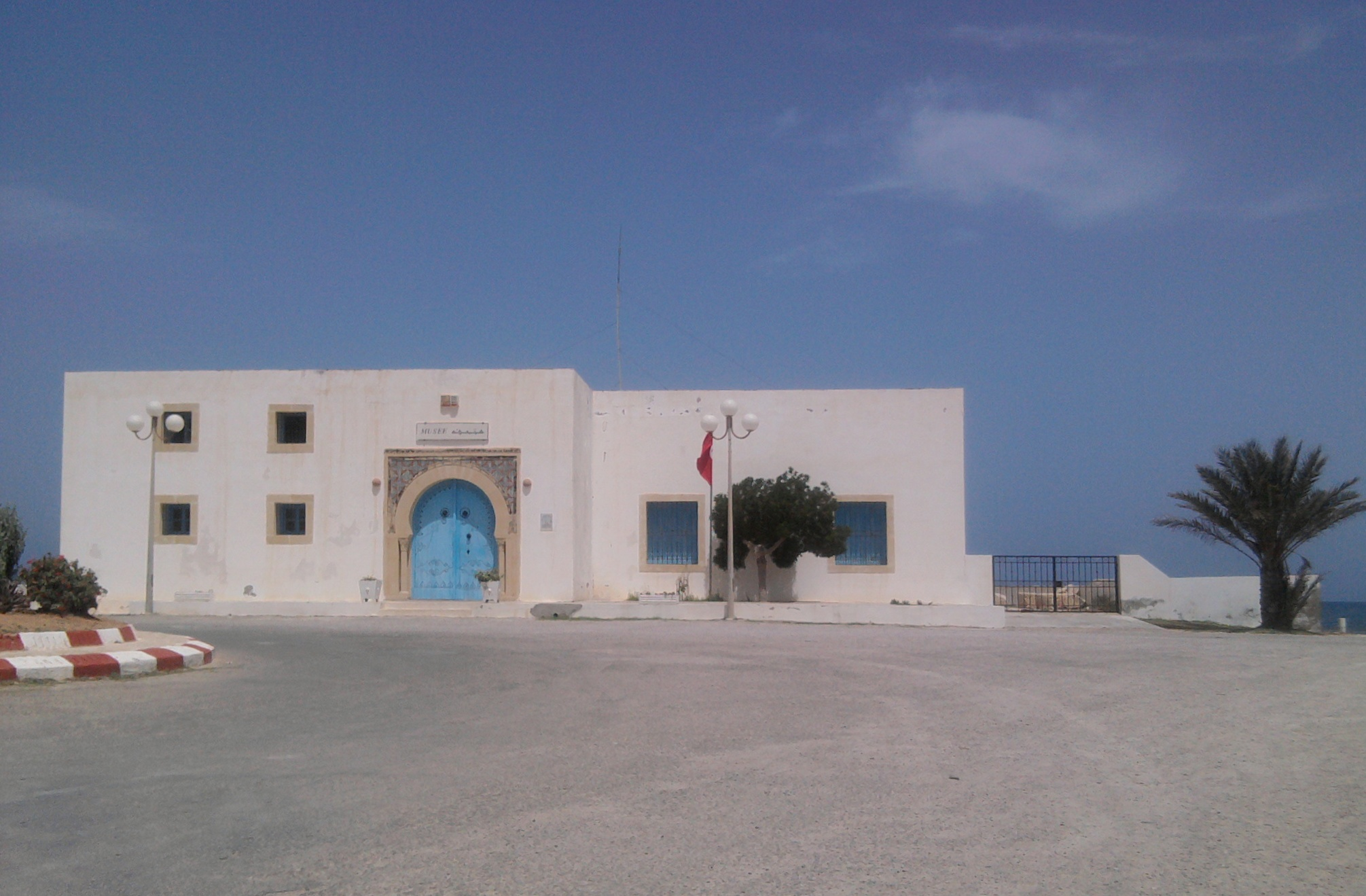 Tunisie, musée archéologique de Salakta